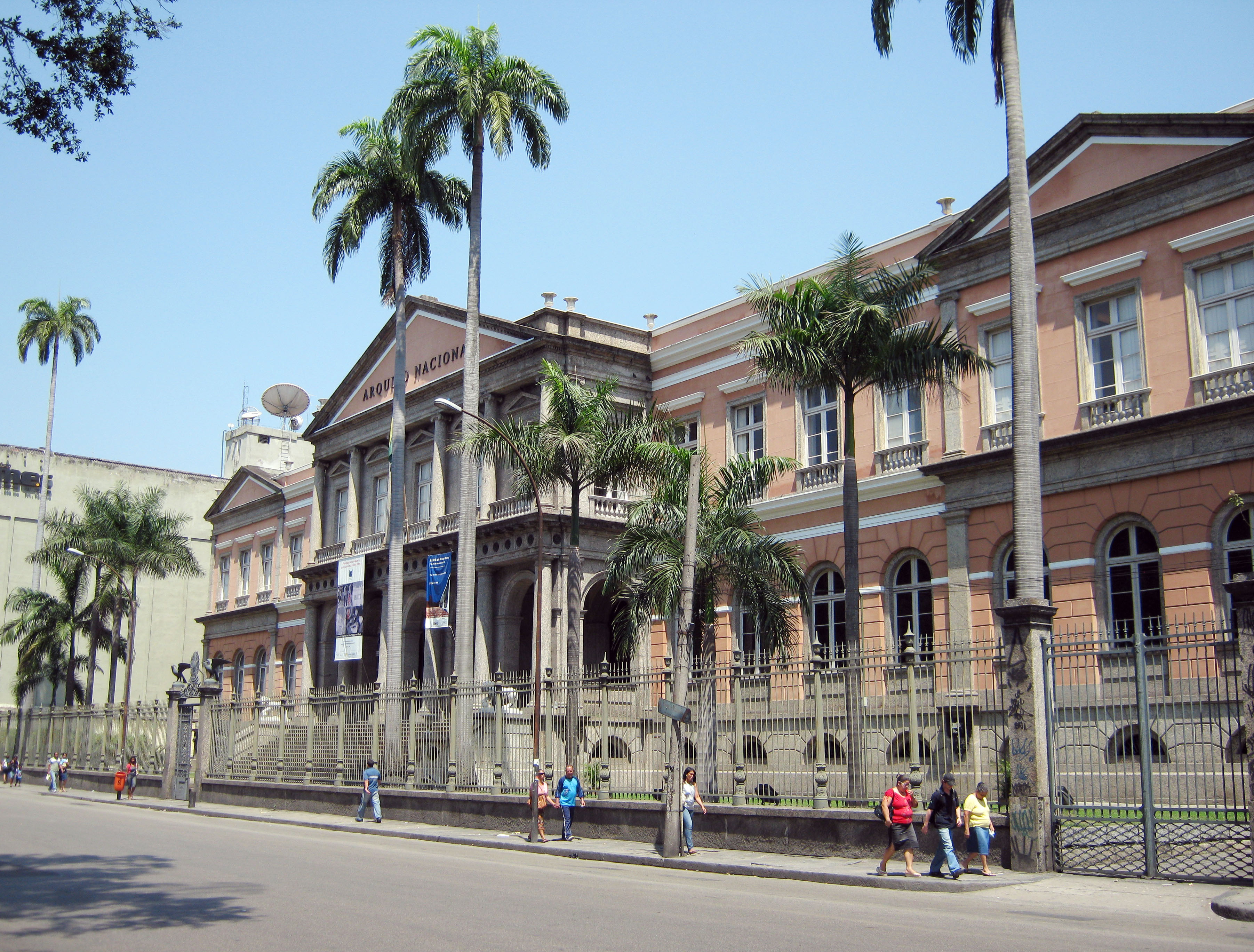 Arquivo Nacional, antigo prédio da Casa da Moeda.